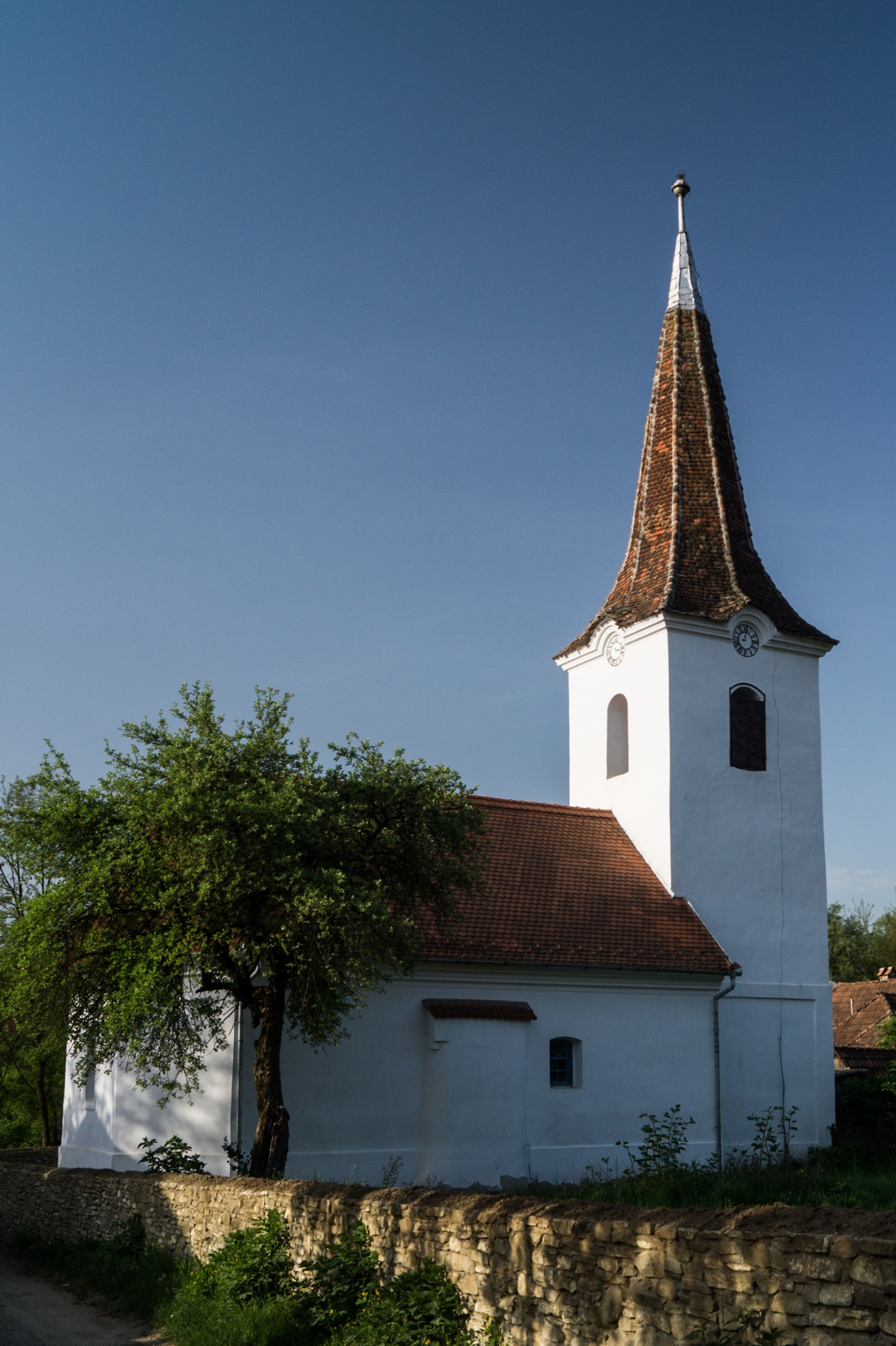 Kőrispatak, unitárius templom